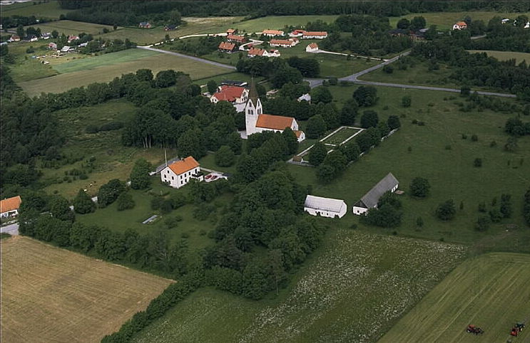 Motiv: Eksta kyrka Nyckelord: Flygbilder, Riksintressen Kategori: Kyrkomiljö Eksta kyrka